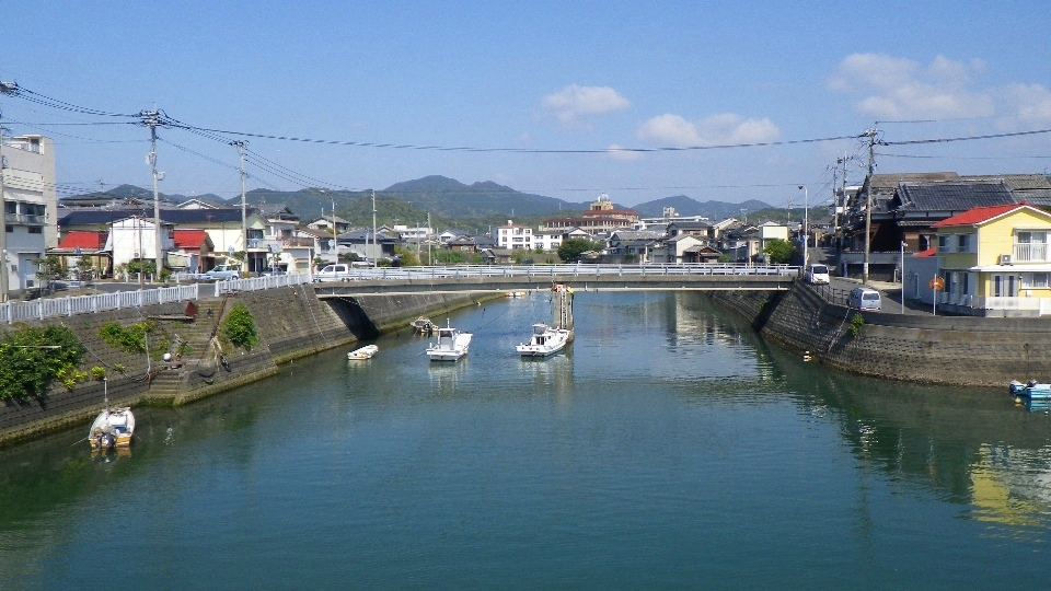 福江川河口。長崎県五島市福江港・港大橋上より